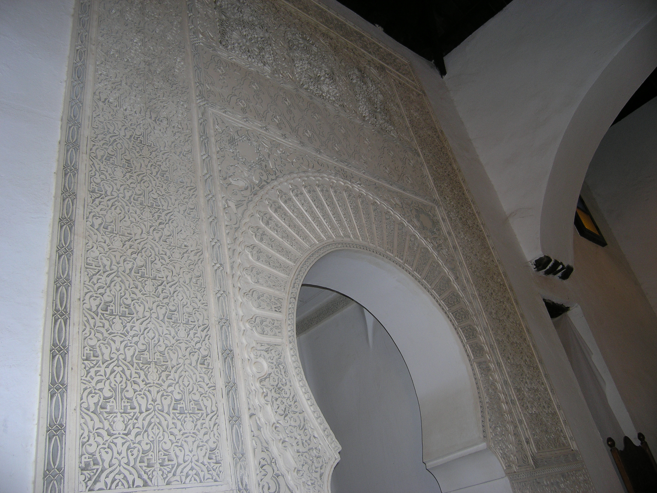 Mosquée du Mechouar